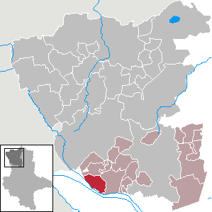 (Original text: Miesterhorst im Altmarkkreis Salzwedel)